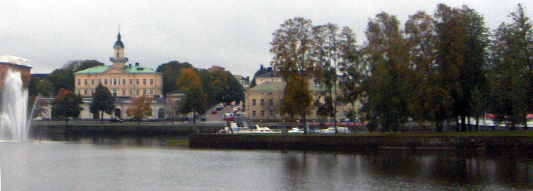 Eteläranta, Pori